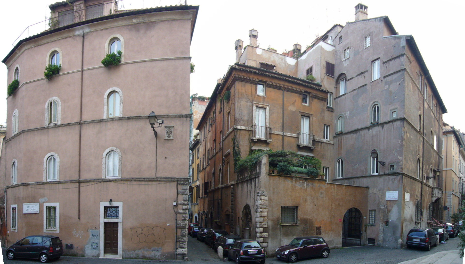 Roma, via Giulia. da sinistra: casa della Confraternità della Pietà, palazzo Sangalletti, palazzo dell'Arciconfraternita dei Fiorentini